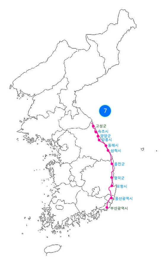 대한민국의 7번 국도, 북한 구간은 자료 불확실